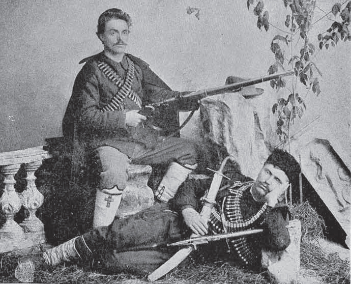 Georgi Kurtev and Stefan Gaydarski from IMARO